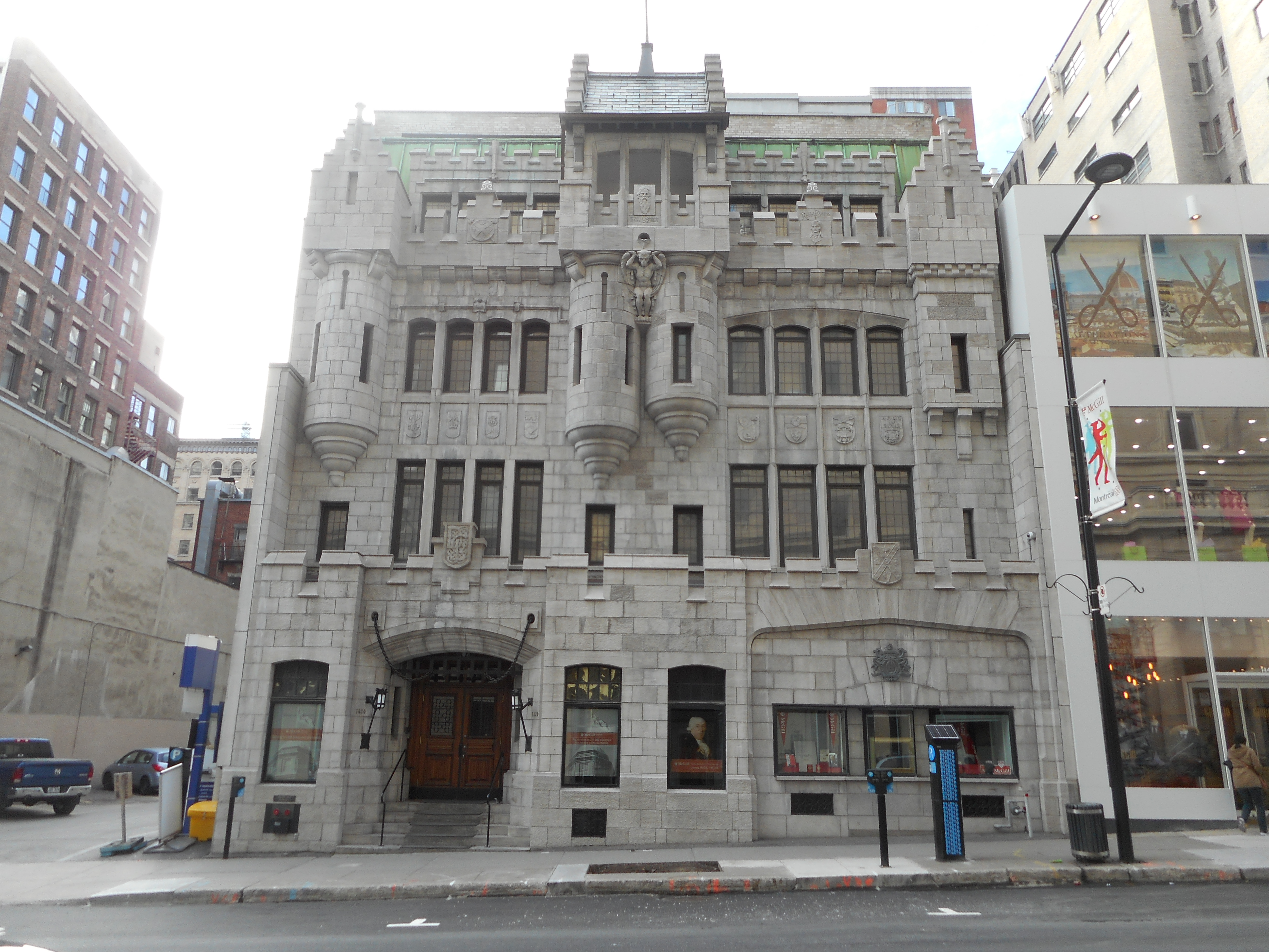 La Maison Seagram ou la Maison Martlet (1928), 1430 rue Peel, Montréal, Québec, Canada